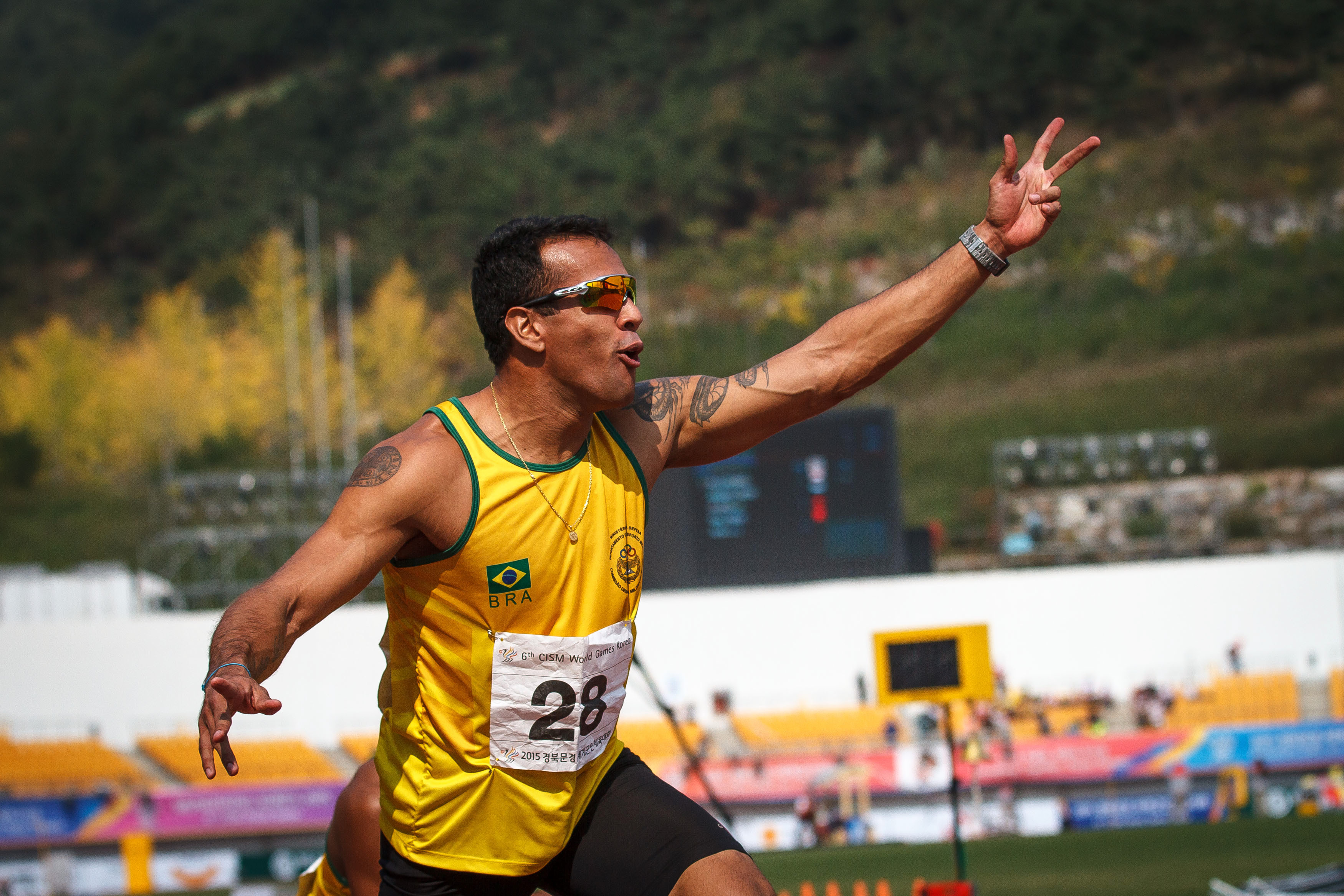 Bruno de Barros nos 200m em Mungyeong pelos 6º Jogos Mundiais Militares. Foto: Sgt Johnson Barros